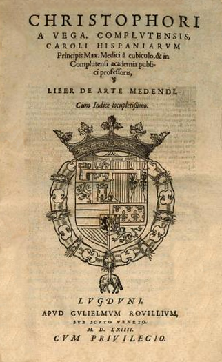 Portada del libro Liber de arte Medendi. Publicado por Cristóbal de Vega en Lyon, en 1564.